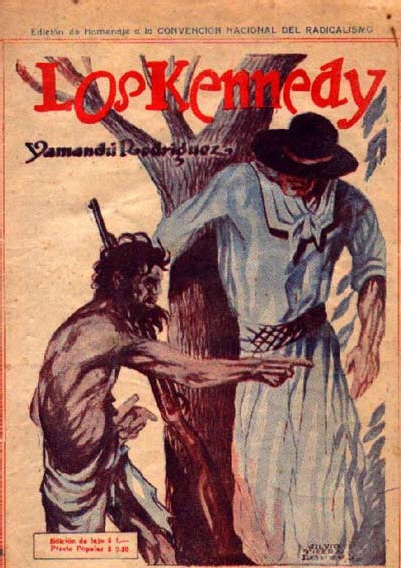 Tapa del libro "Los Kennedy" del escritor y periodista uruguayo, Yamandú Rodríguez (1934)